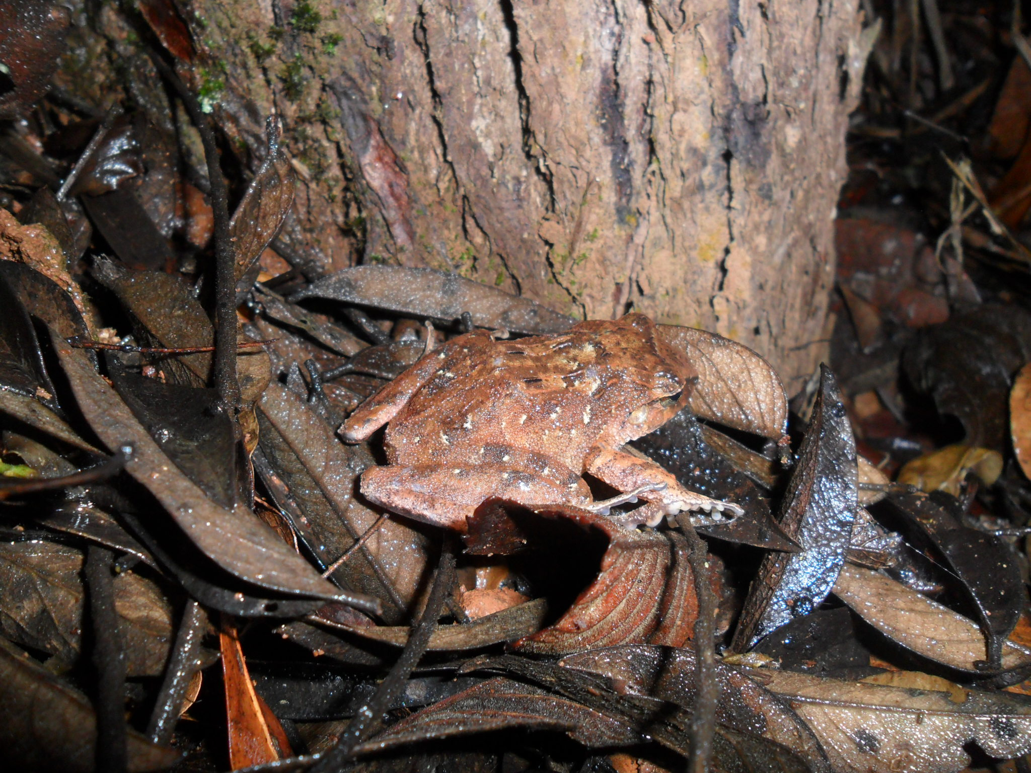 Pertence ao gênero anteriormente denominado bufo